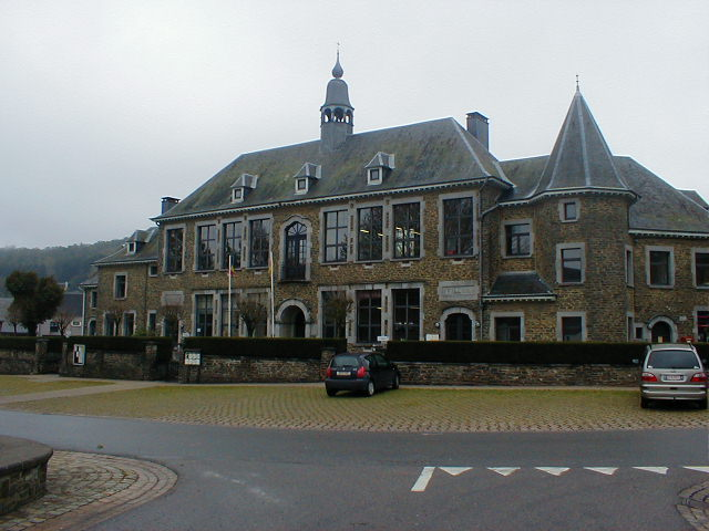 Walon: Arbûmont : Li måjhon-comene eyet les scoles